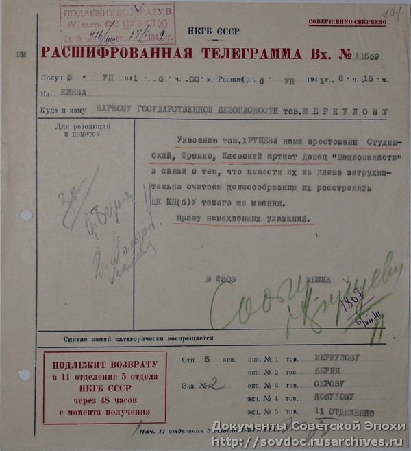 запрос на расстрел Студинского